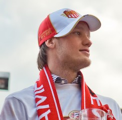 Mika Väyrynen